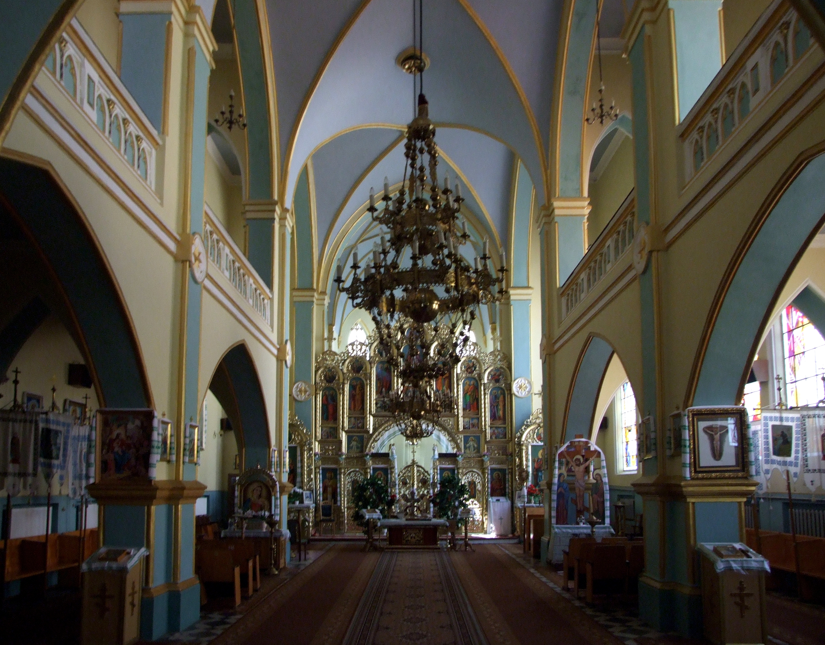 Церква Св. Михаїла (Колишній костел св. Йосипа ордену сестер Серафіток), 1907 р.